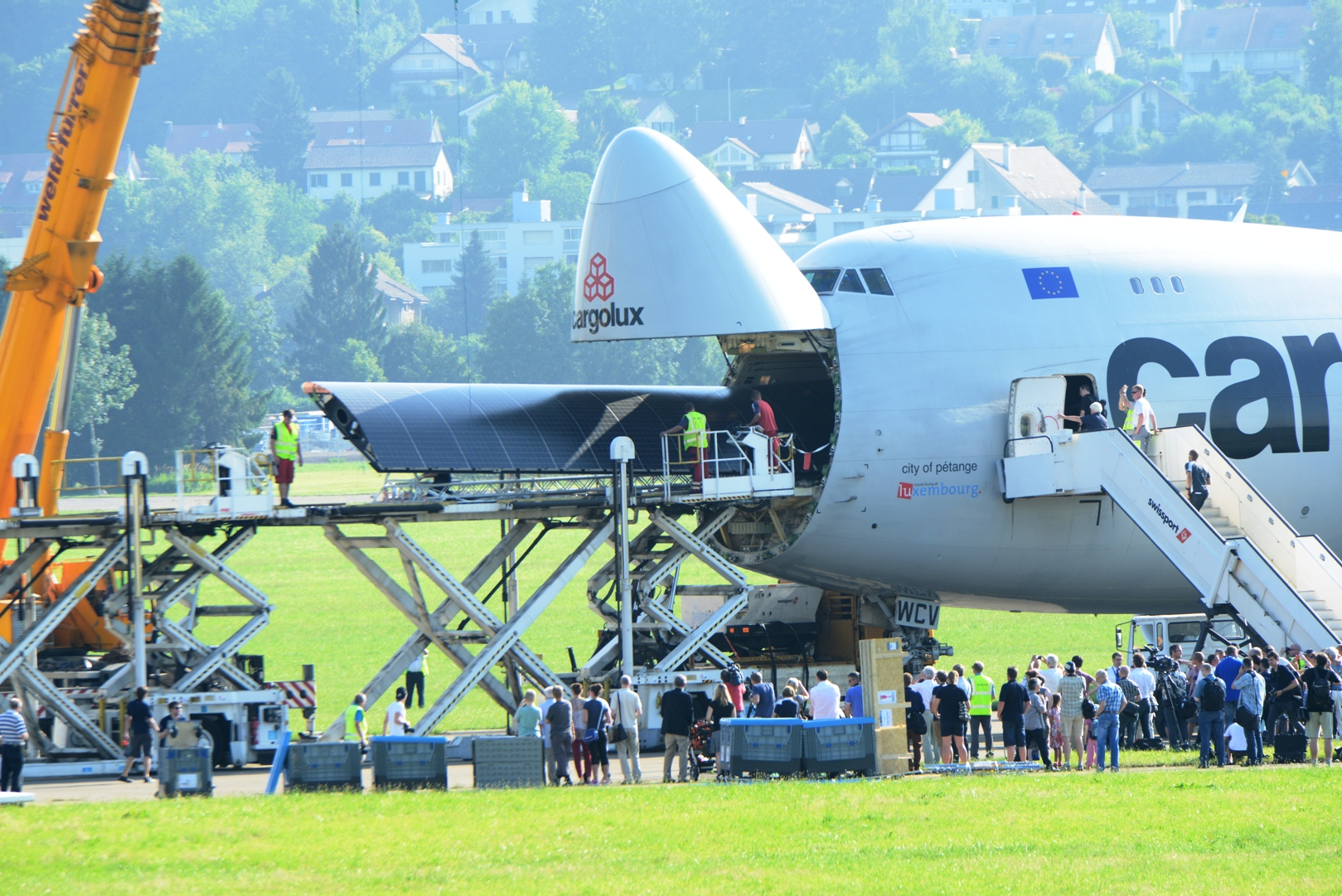 Cargolux at LSMD